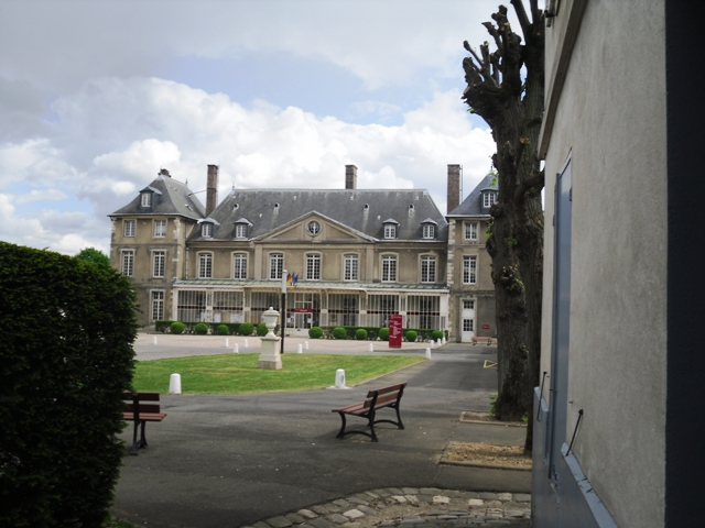 La façade occidentale sur château d'Athis à Athis-Mons (91)